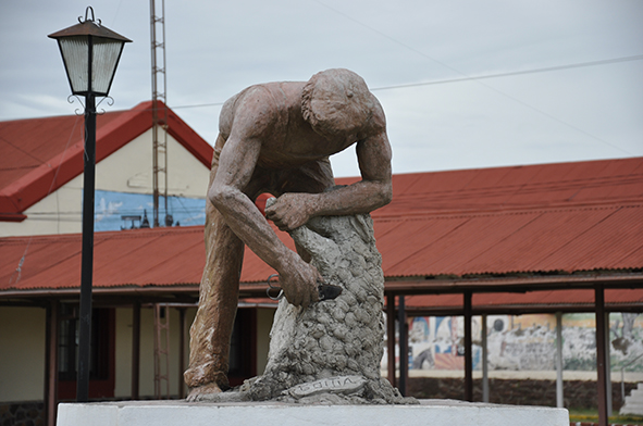 Monumento a la esquila de ovinos.